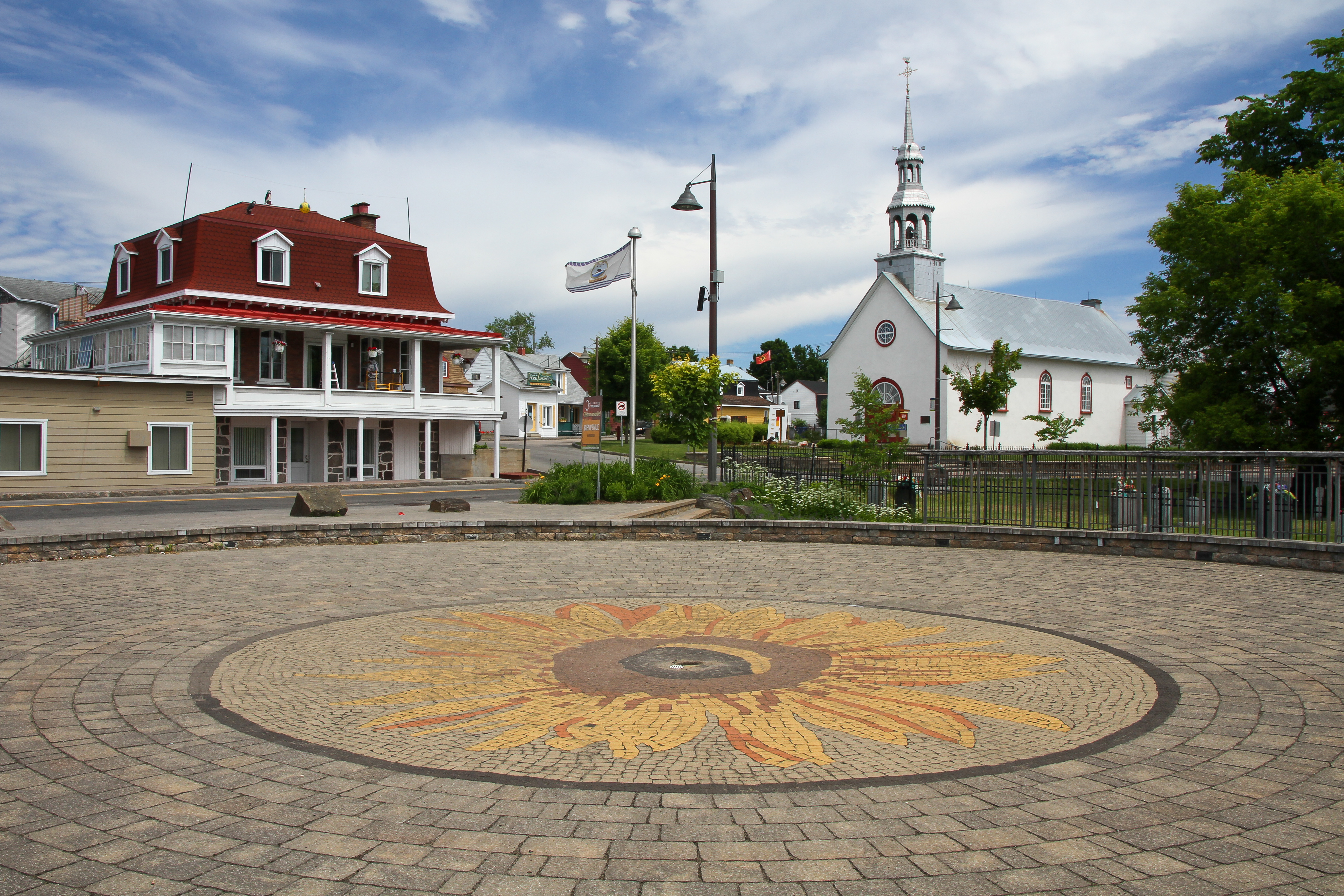 Le tournesol de la Place de la nation huronne-wendat à Wendake, avec la chapelle Notre-Dame-de-Lorette en arrière-plan